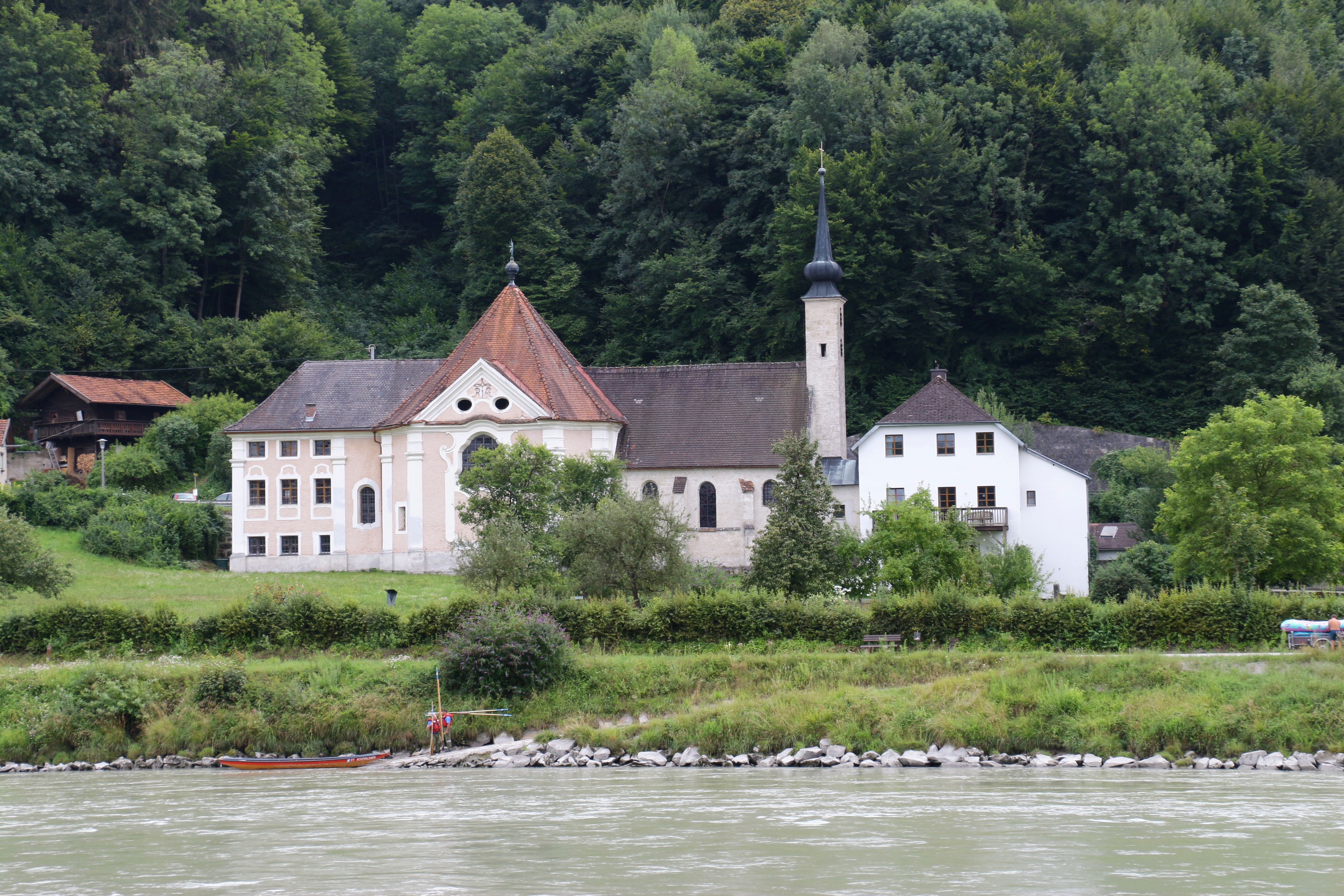 Kirche Maria Ach in der Gemeinde Hochburg-Ach, von der deutschen Seite der Salzach in Burghausen (Landkreis Altötting) aus gesehen